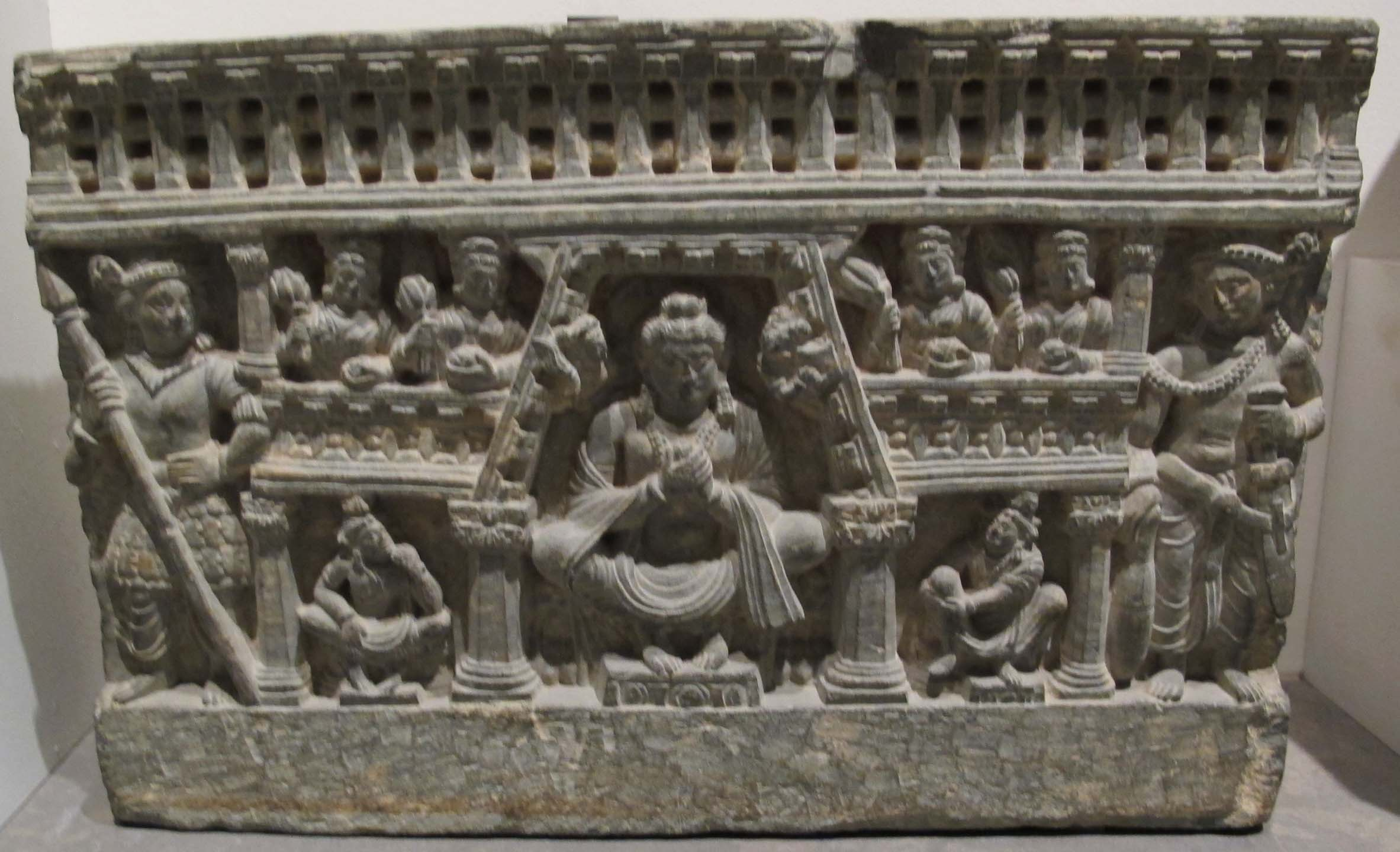 Afghanistan, paradiso di maitreya, regione di kapiça, monastero di shotorak, II-III sec.